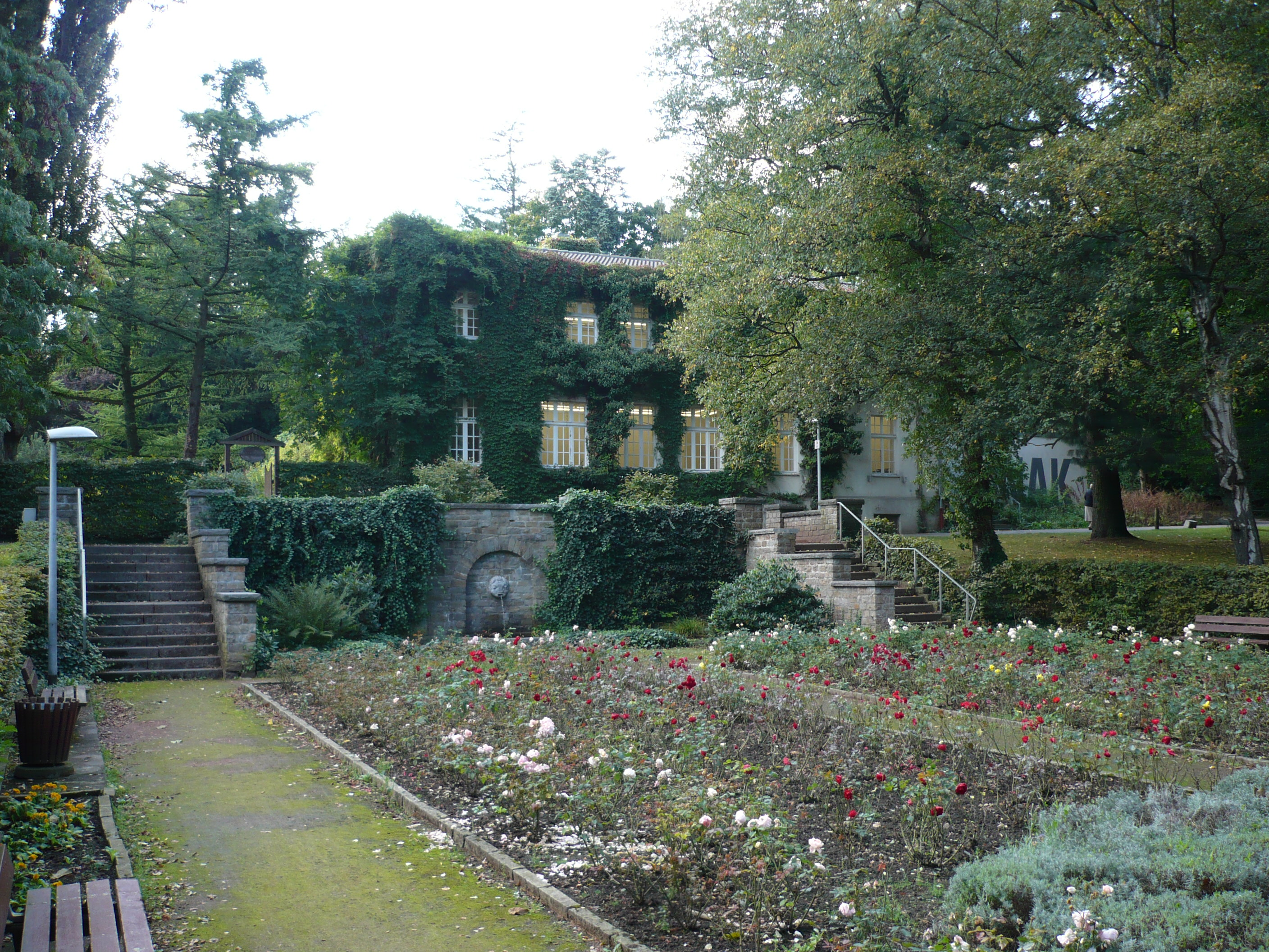 Aachener Rosengarten des Stadtgartens (Farwickparks), Anlage vor dem Gebaude des NAK